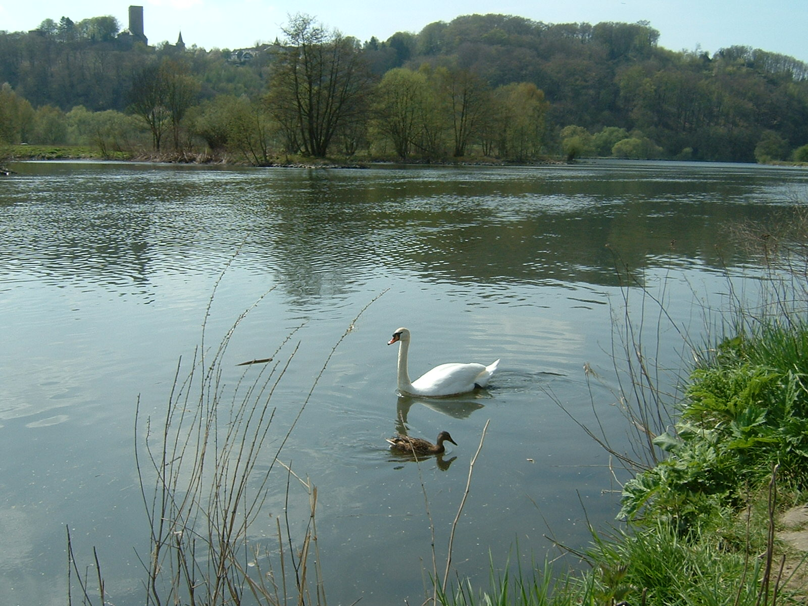 Blick von Bochum-Stiepel, An der Alten Fähre, in Richtung Blankenstein (Hattingen)